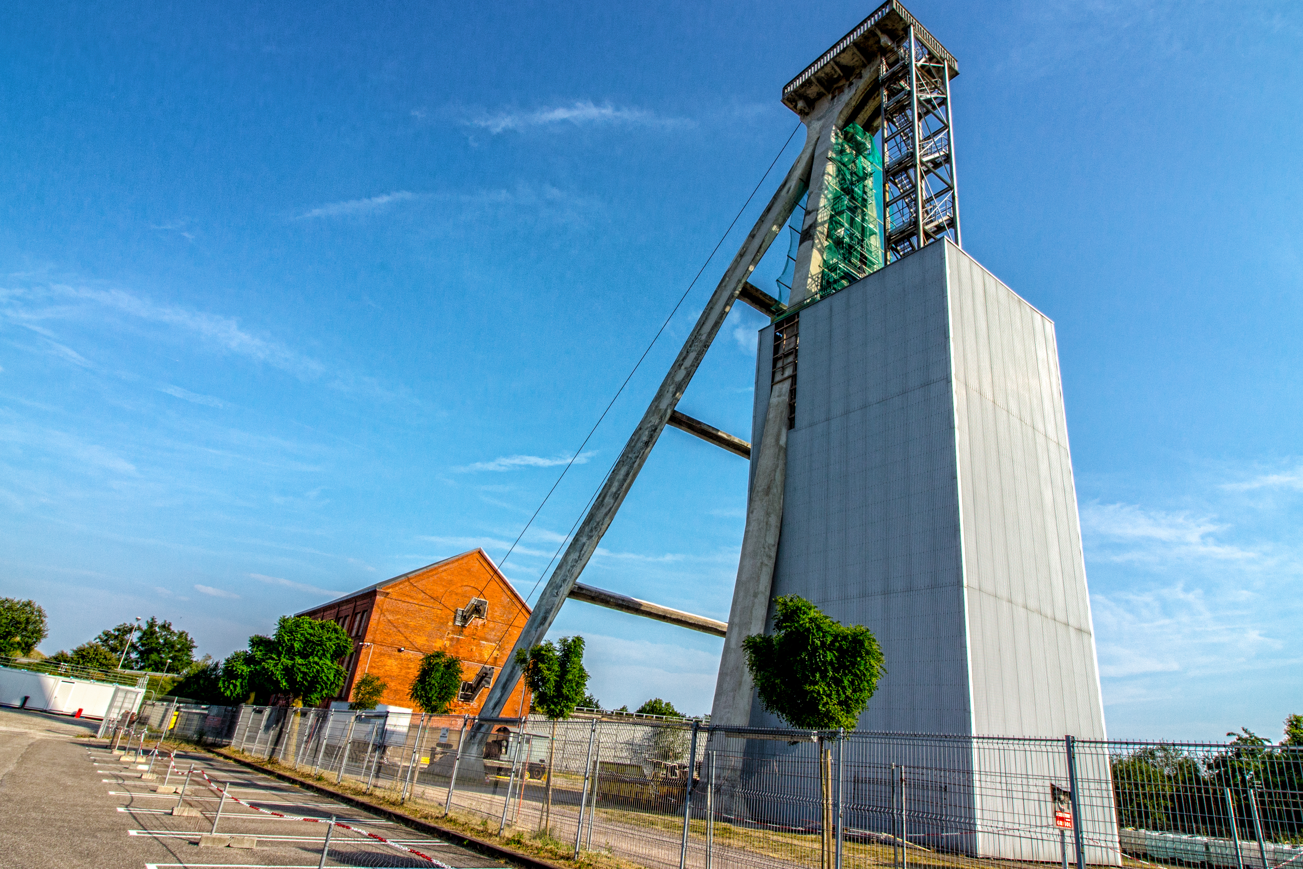 mine de potasse